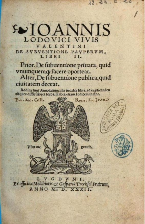 Portada de l'obra "De subuentione pauperum" de Lluís Vives. Lugduni (Lió) : ex officina Melchioris & Gasparis Trechsel fratrum, 1532.